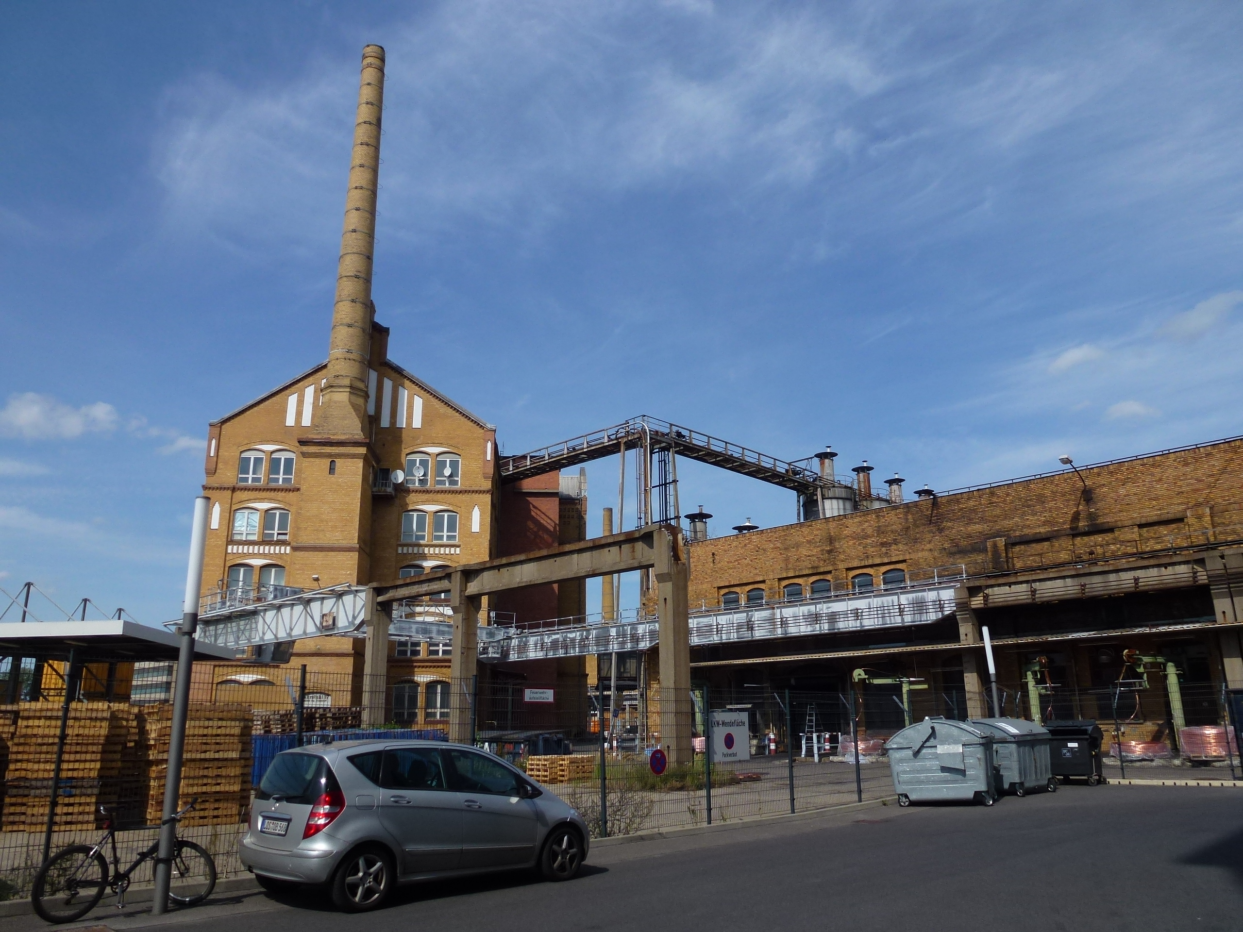 Berlin-Oberschöneweide Johannes-Kraatz-Straße Kabelwerke, re. Teilobjekt Hallenblock V (KWO 68), li. Teilobjekt Gebäude A 3 (KWO 70)